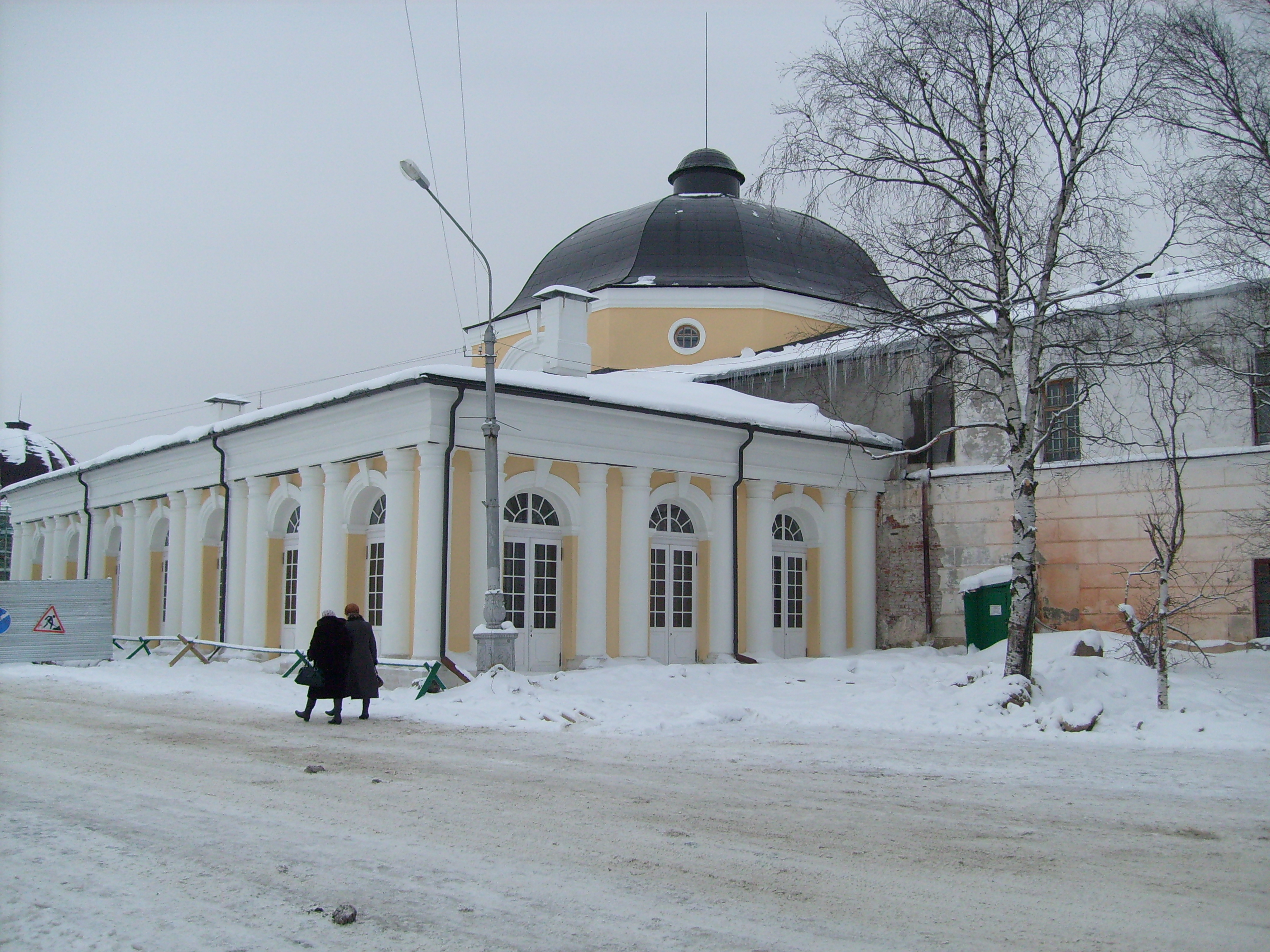 Архангельск, Набережная Северной Двины, 85, биржа и башня Русского гостиного двора, 1789—1790, Архитектор М. Березин